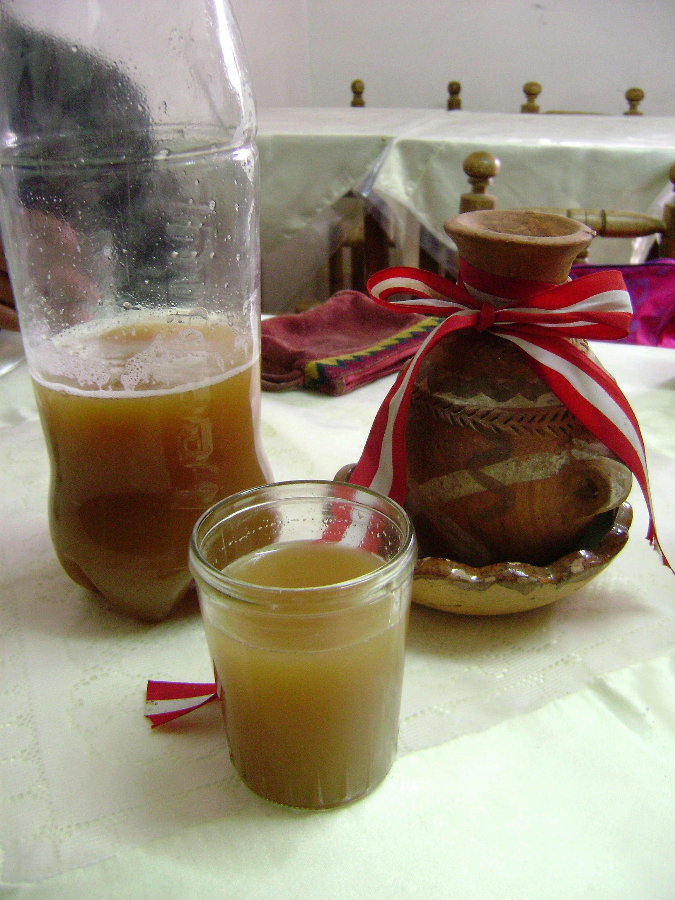 Chicha de jora. Huancayo, Perú.